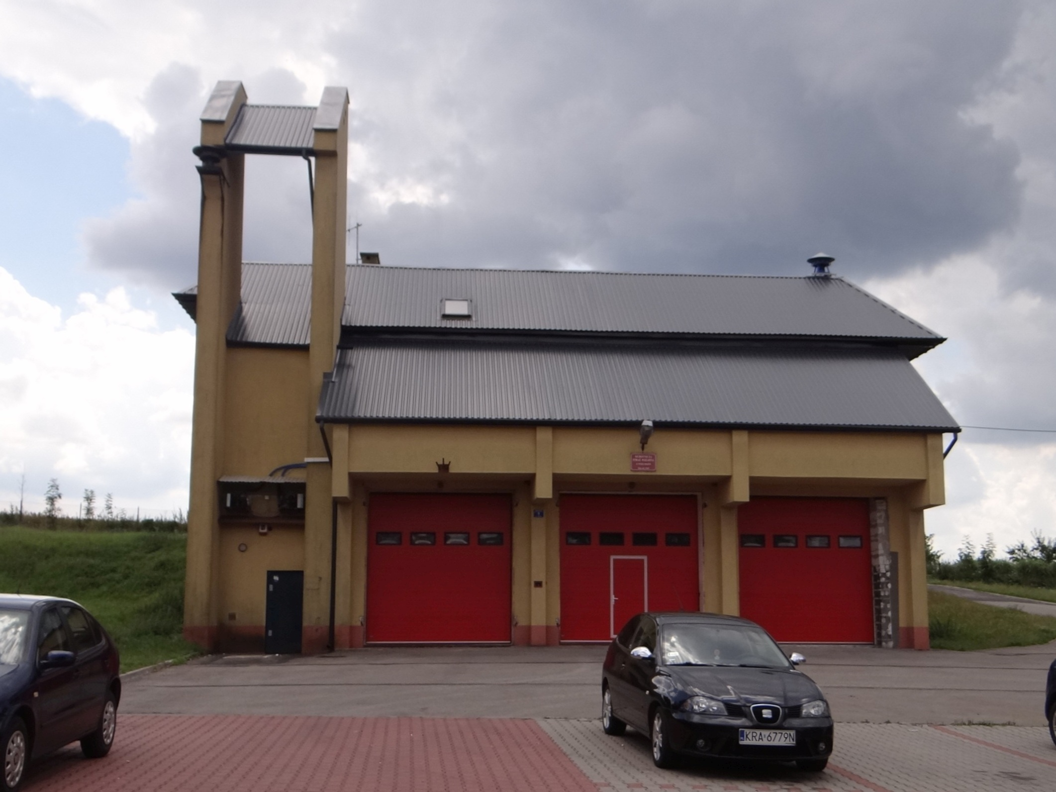 Remiza OSP w Wielmoży